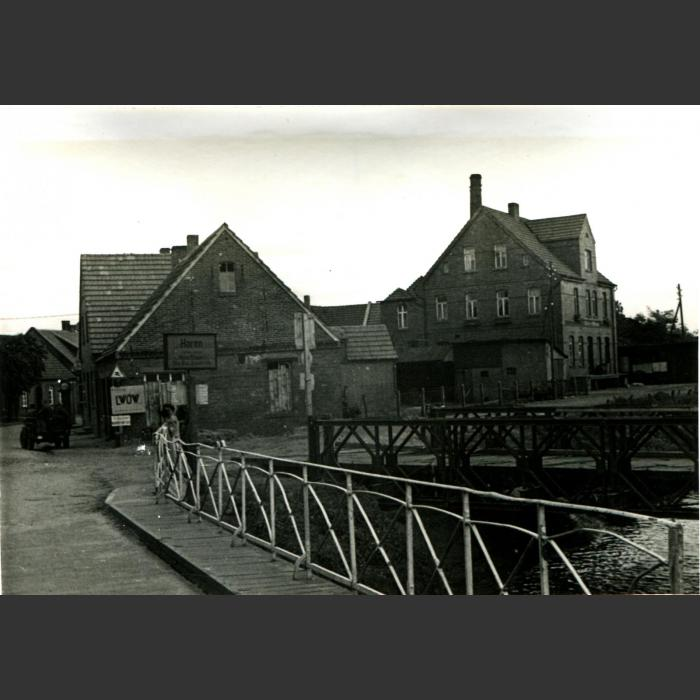 Powojenny Maczków